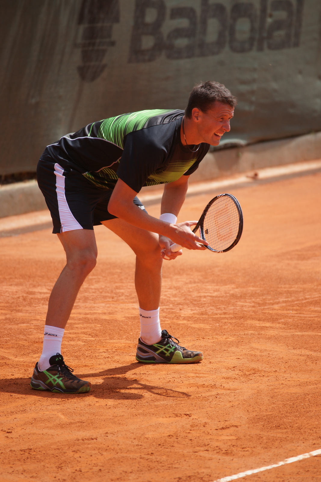 Kenny De Schepper, Open Nice 2012